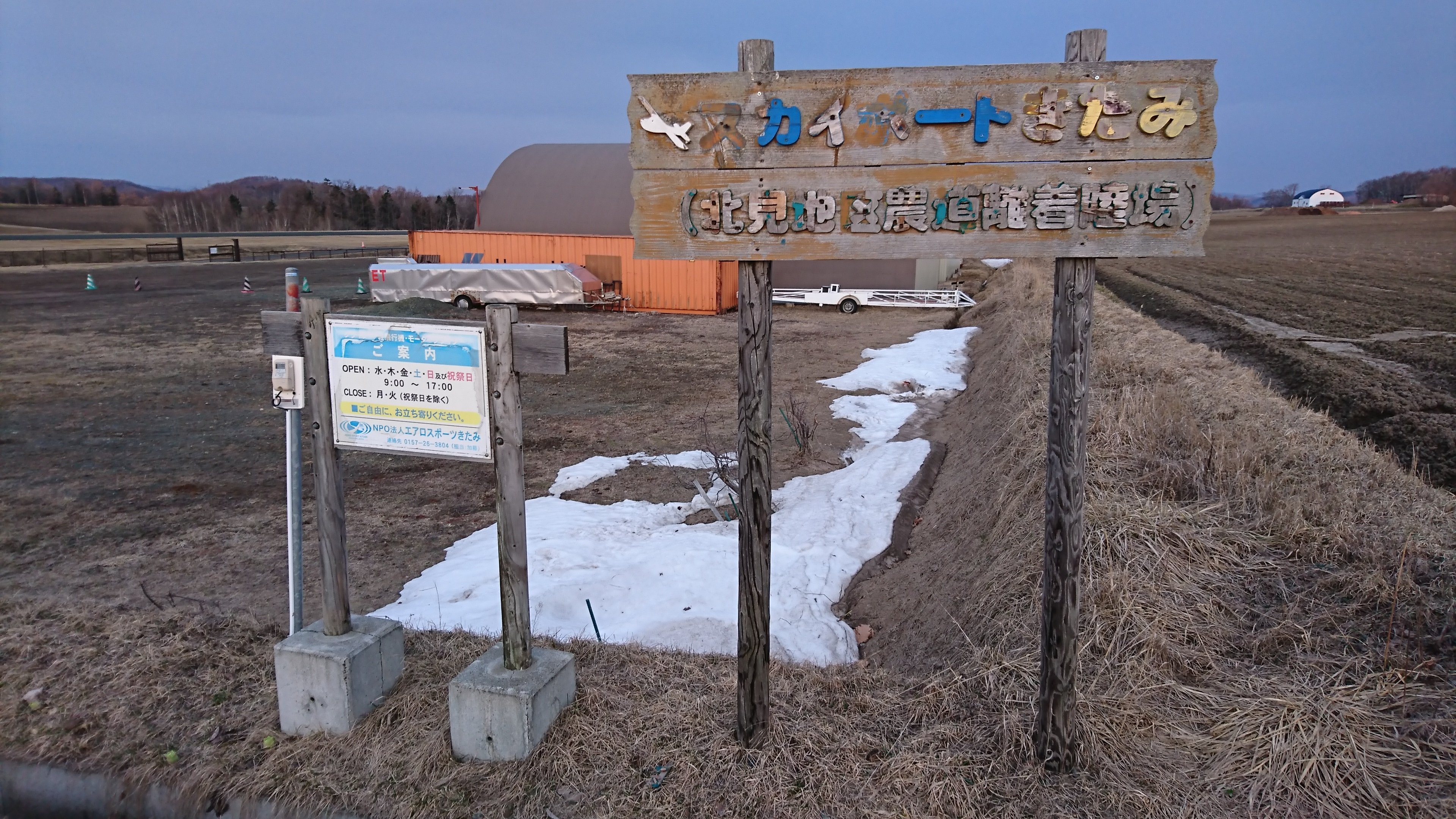 スカイポートきたみ